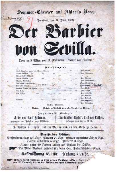 Der Barbier von Sevilla, Theaterplakat, Sommertheaters Brandenburg, Gastspiel 8. Juni 1869